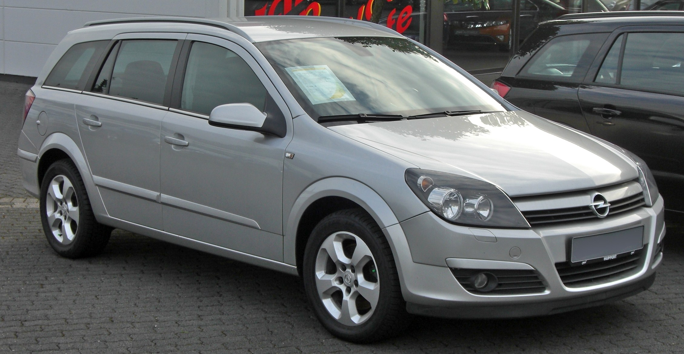 Opel Astra Caravan